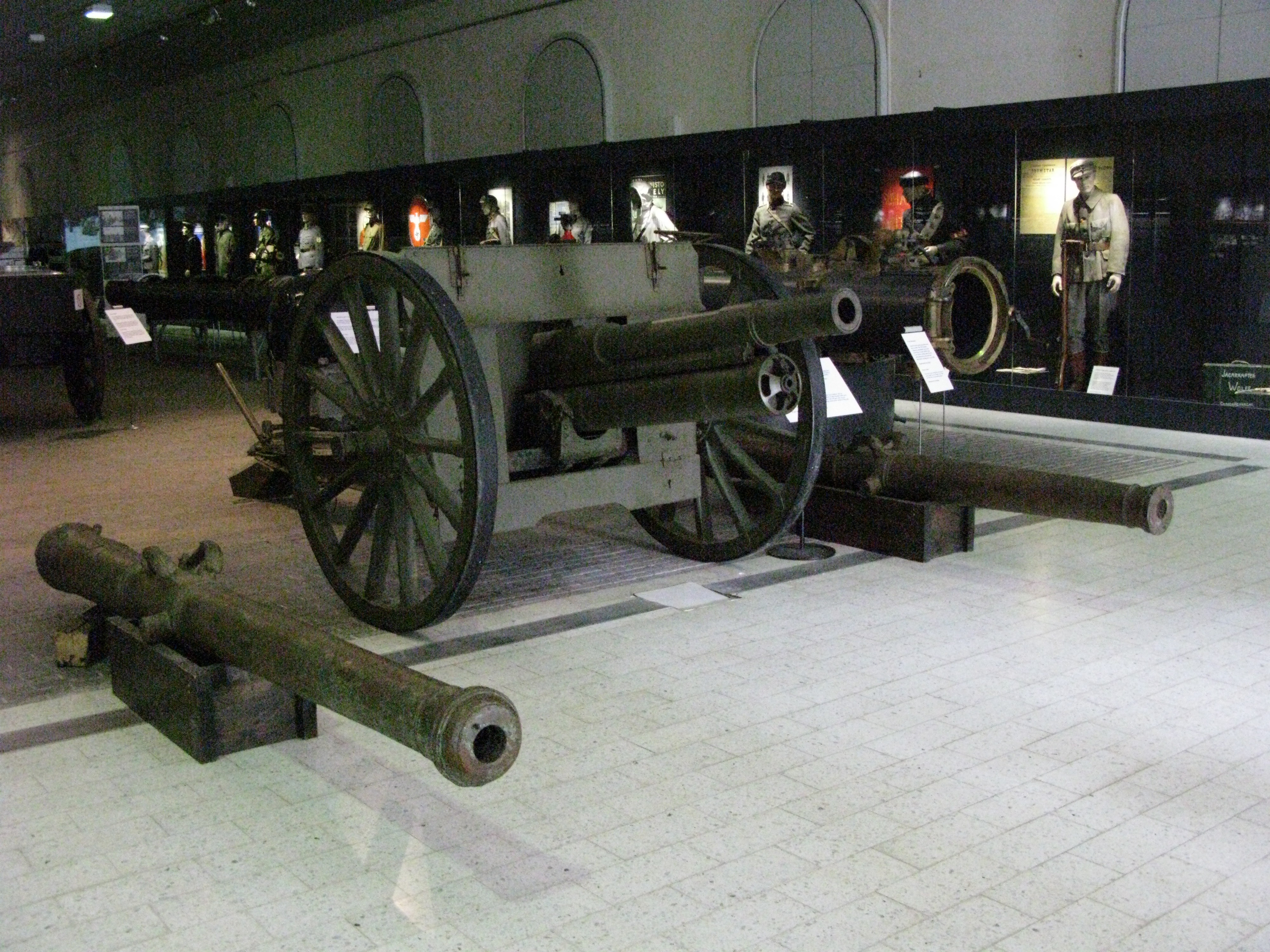 Maneesin eteinen